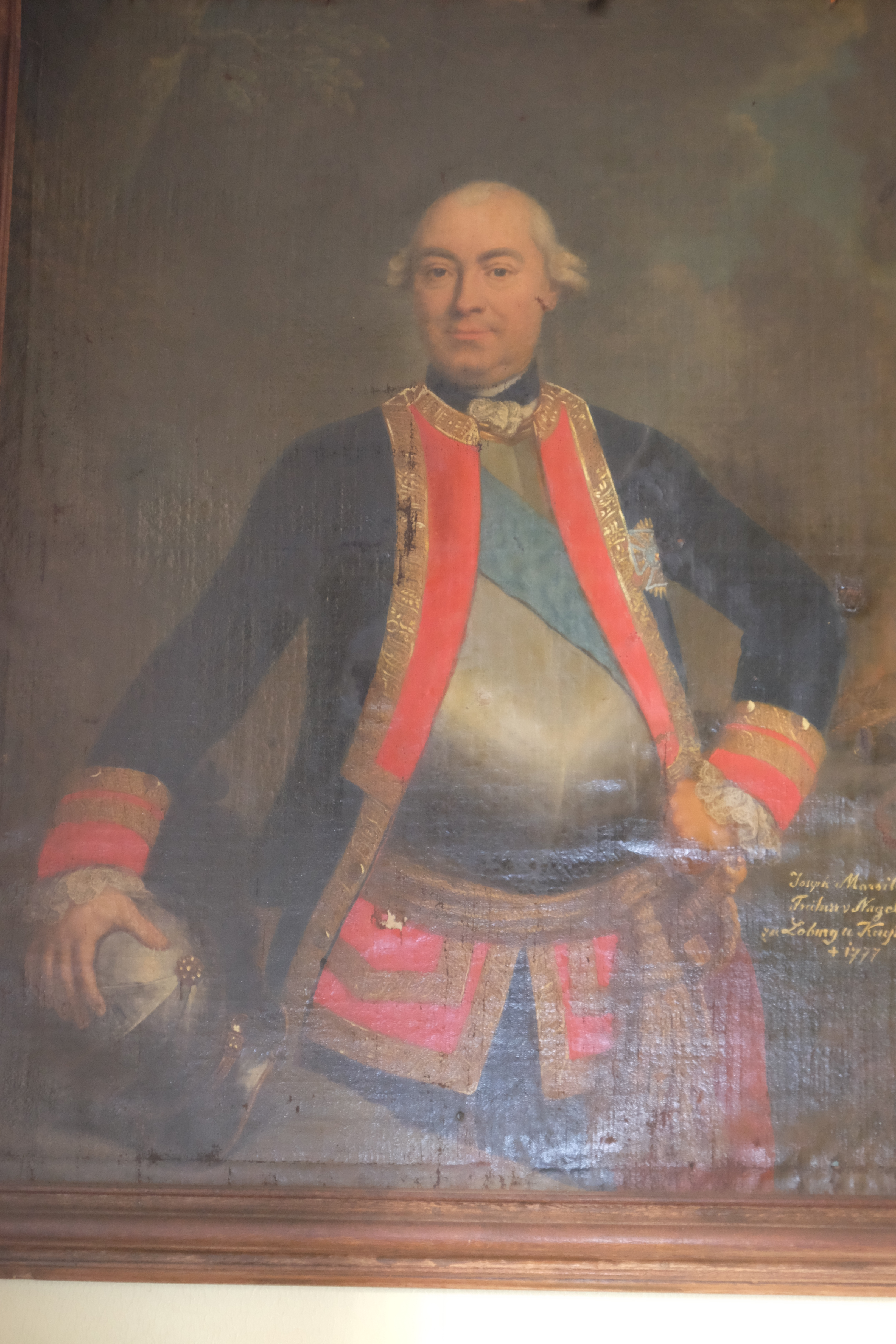 Schloss Tatenhausen mit freundlicher Genemigung von Freiin von Teufel zu Birkensee